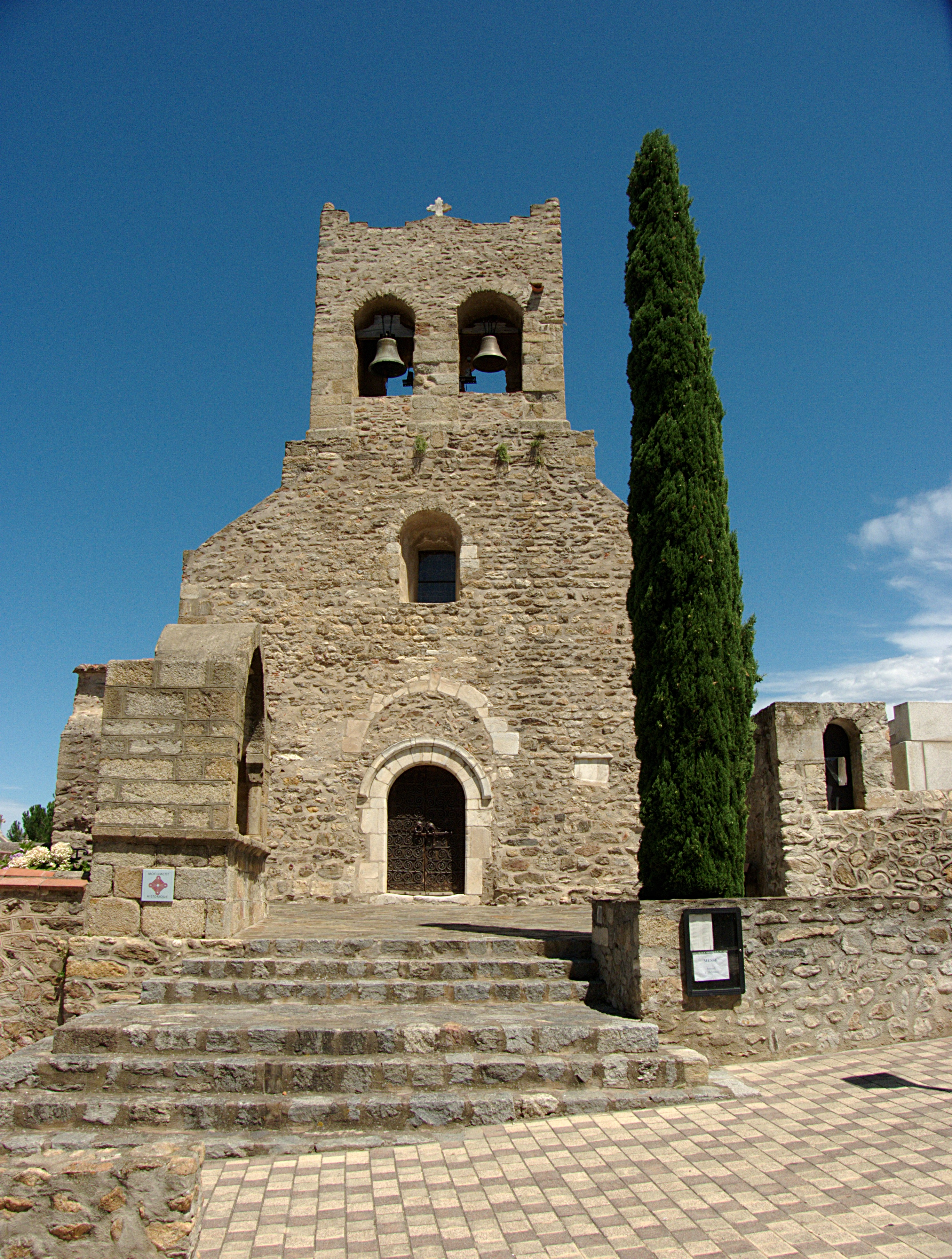 Façade et entrée de l'église Saint-Saturnin (12ème siècle), Montesquieu des Albères (Pyrénées-Orientales, Languedoc-Roussillon, France)